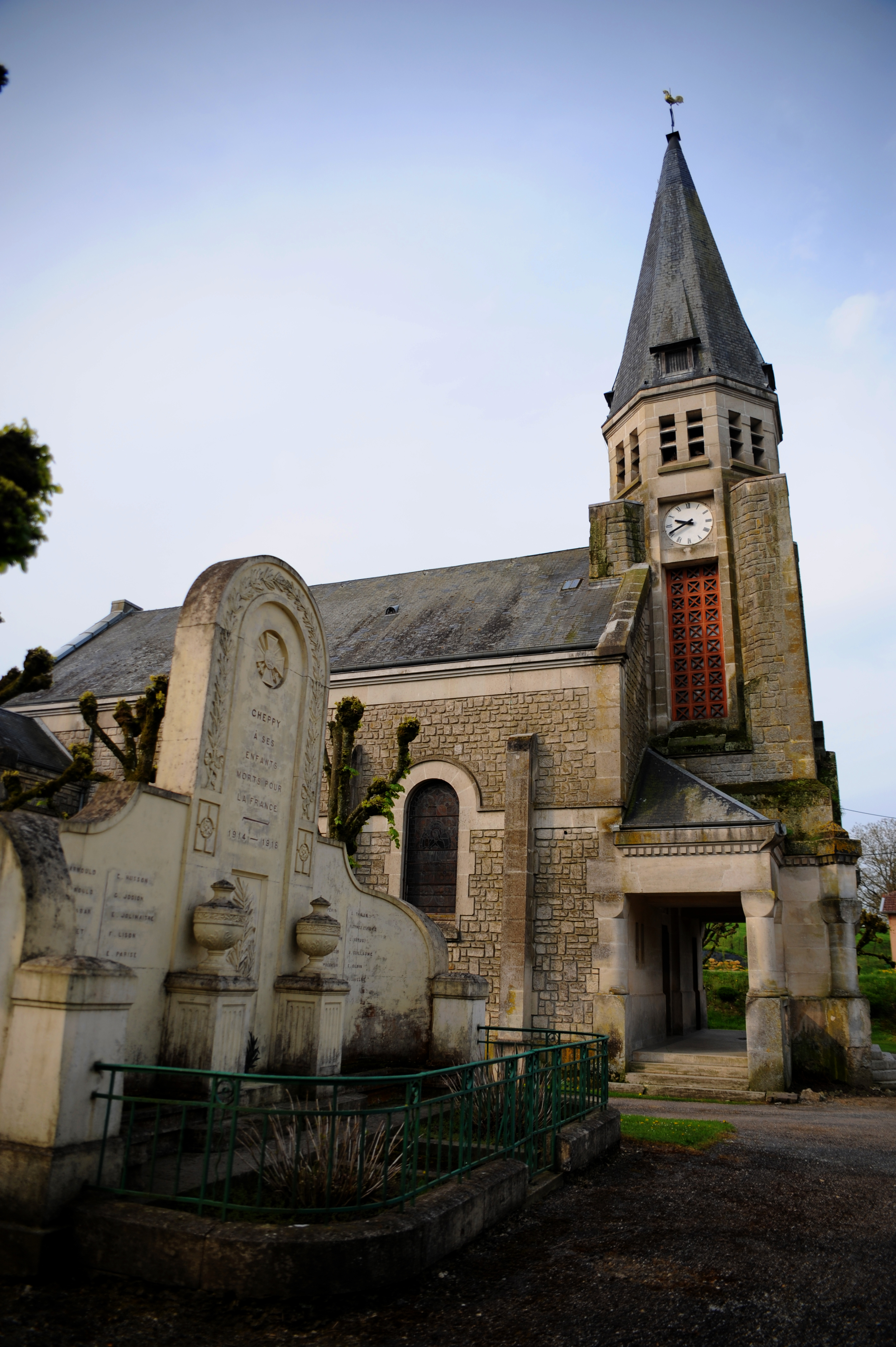 Cheppy, l'église